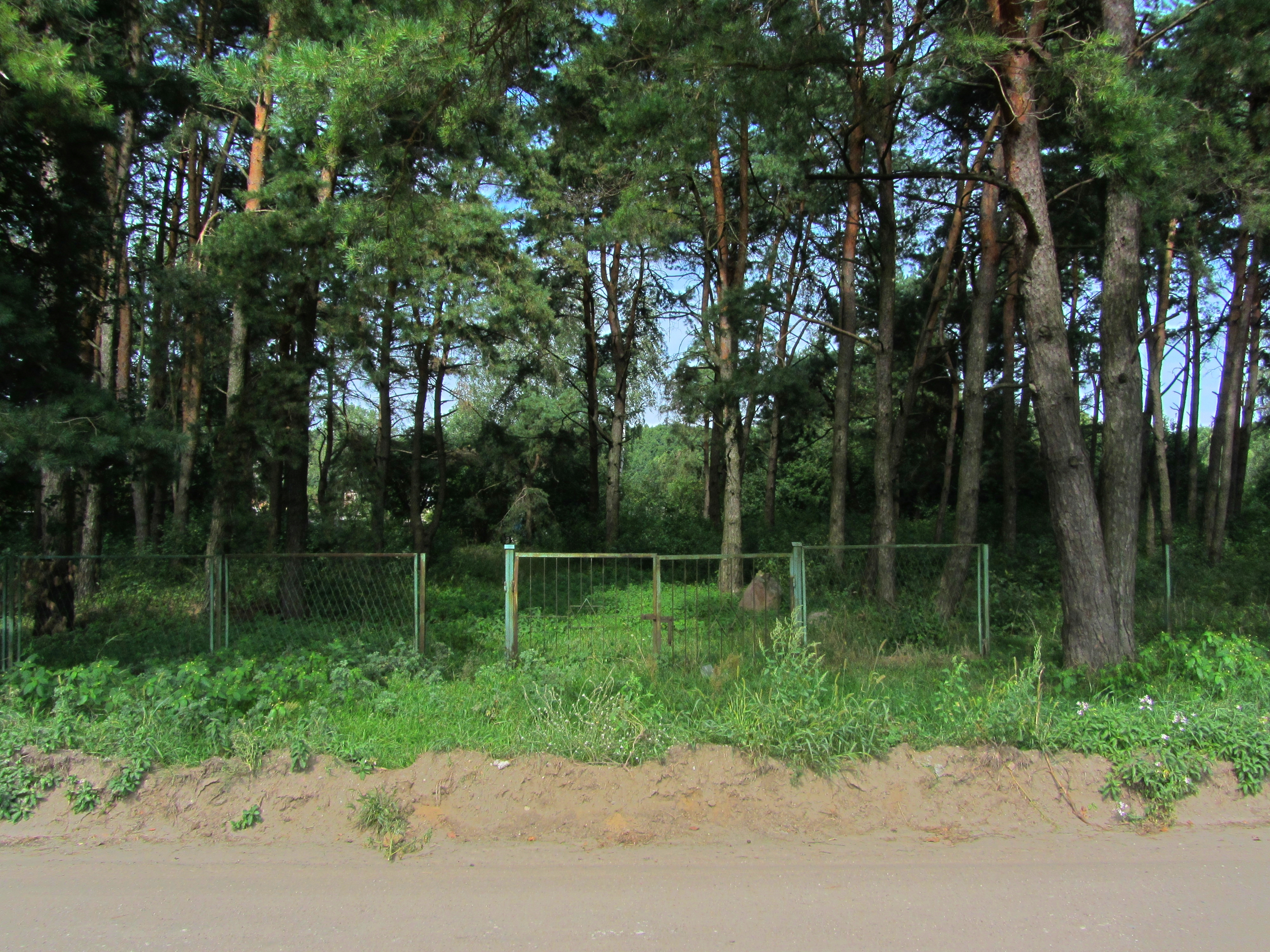 Cmentarz żydowski w Choroszczy, gm. Choroszcz. Choroszcz, Choroszcz